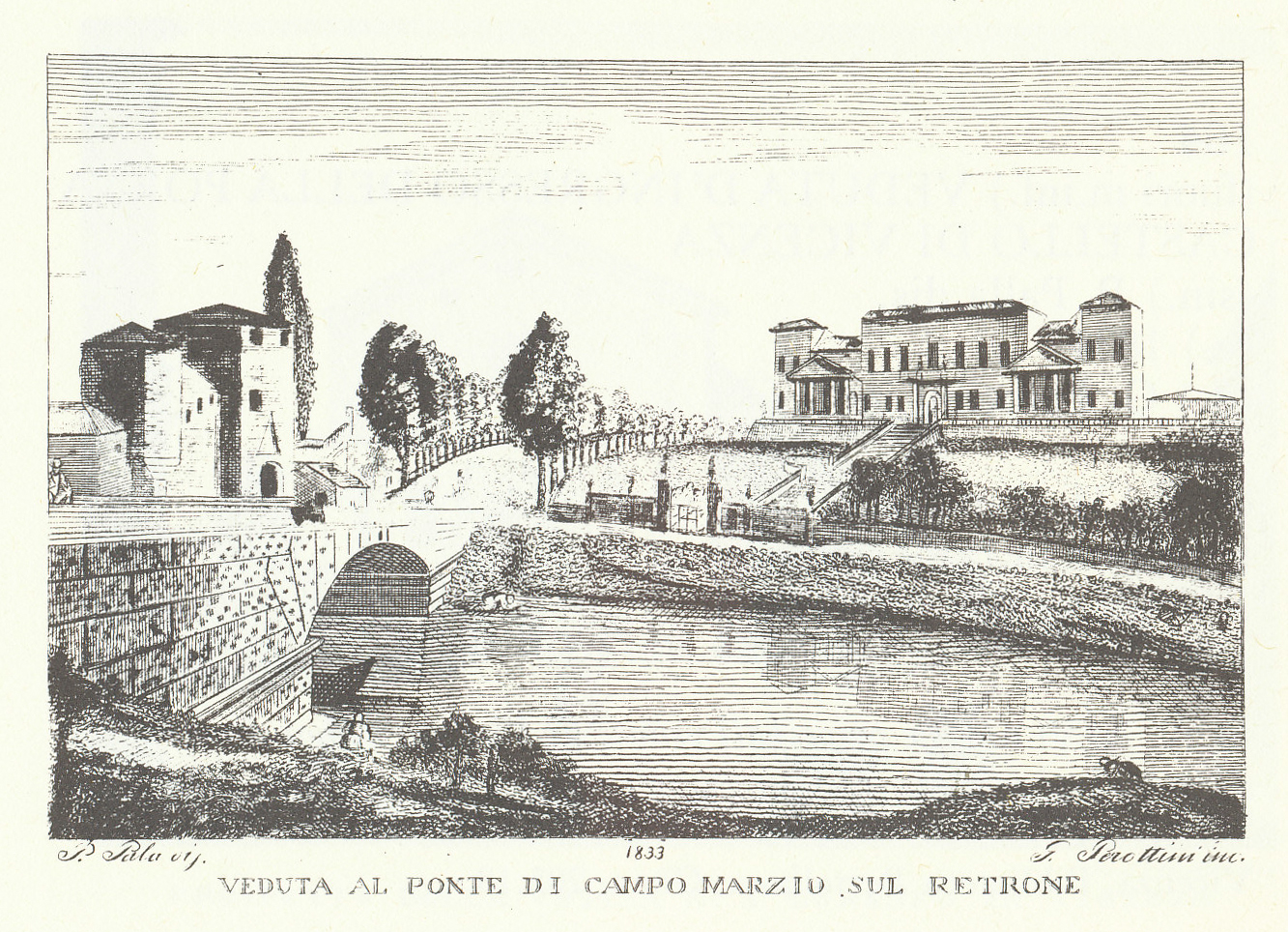 Ponte Santa Libera, incisione del 1833 di G. Perottini, tratto da Vicenza città bellissima, Iconografia vicentina a stampa dal XV al XIX secolo, Biblioteca Civica Bertoliana, Vicenza 1983, p. 162. Sulla destra villa Volpe.